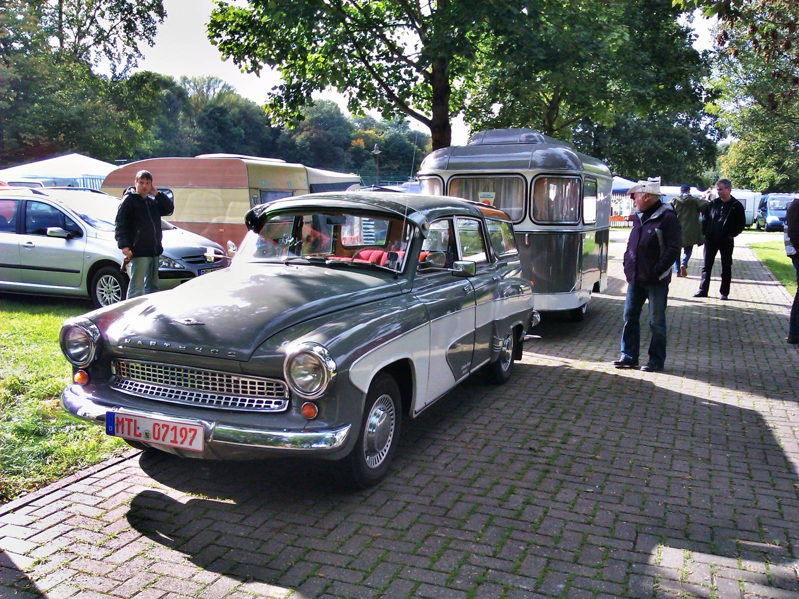 Zwei besondere Dresdner: Der Wartburg 312 Camping (aus dem Karosseriewerk Dresden) mit Nagetusch-Wohnwagen